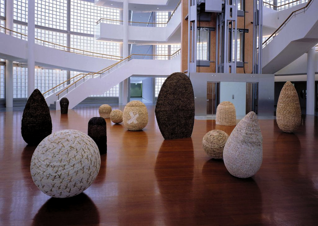 Zeithüllen wurde dem Ensemble von 12 Objekten zugeordnet und dem Katalog als Motto vorangestellt. Hier liegt ein Schlüssel zum Verständnis dieses Werkzyklus bereit.